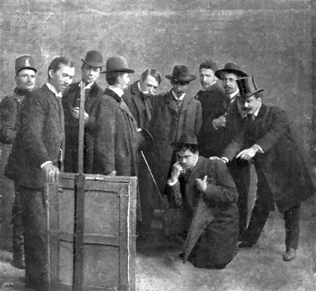 Un juriu al Tinerimii artistice din anul 1905. Pot fi identificați: Ștefan Luchian, Constantin Artachinono, Oscar Späthe, Ipolit Strâmbulescu, Arthur Verona, Gheorghe Petrașcu, Kimon Loghi și Frederich Storck